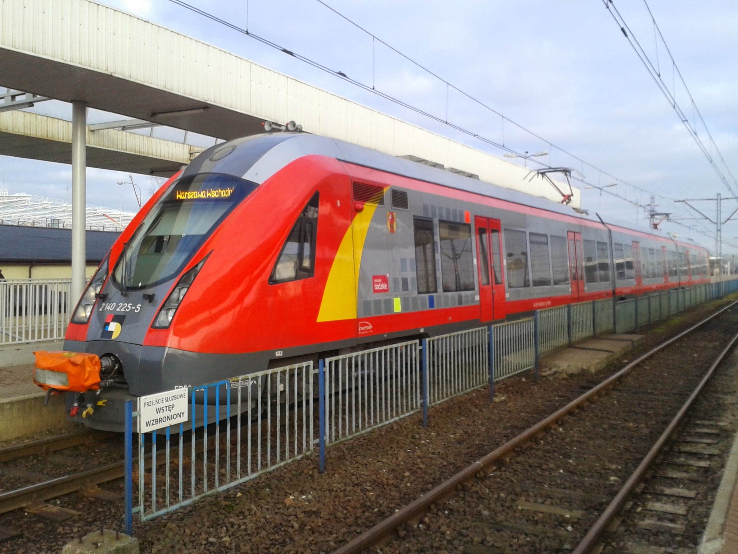 Elektryczny zespół trakcyjny Pesa ED59 "Acatus" (łac. łódź) należący do województwa łódzkiego oczekuje na stacji Łódź Kaliska na odjazd do Warszawy Wschodniej jako pociąg interREGIO Przewozów Regionalnych